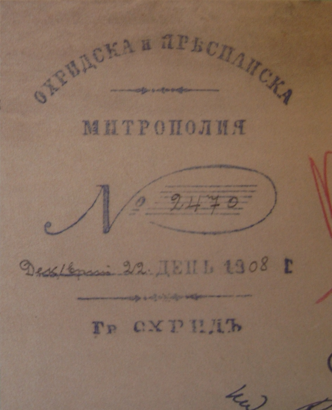 Глава на документ на Охридската българска митрополия